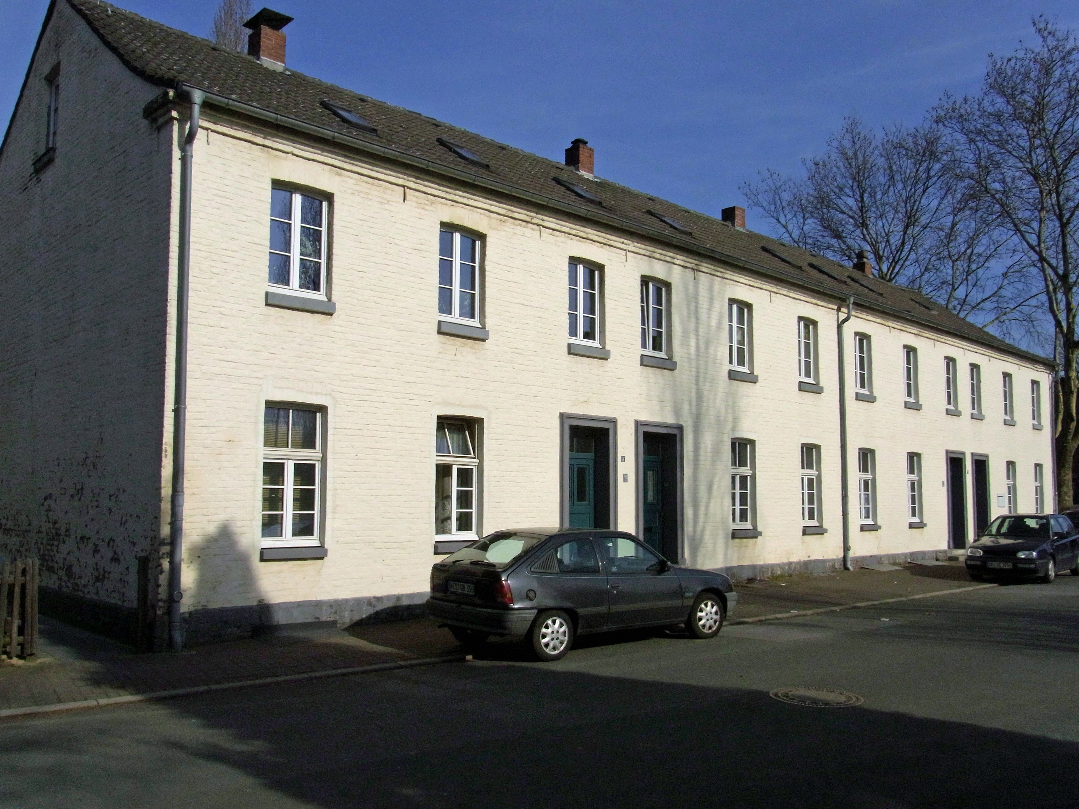 Siedlung Eisenheim